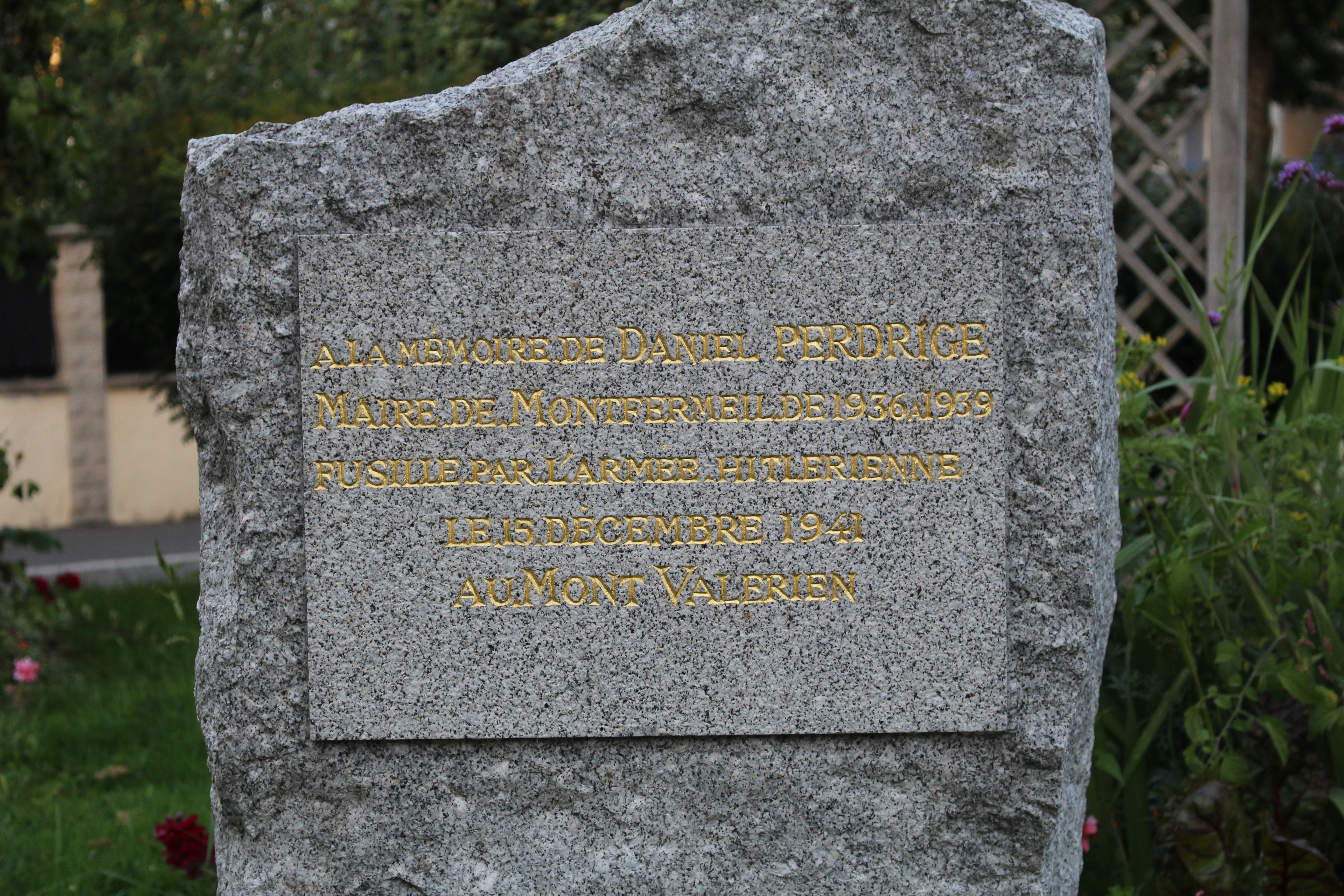 Stèle en l'honneur de Daniel Perdrige près de l'hôtel de ville, Montfermeil.